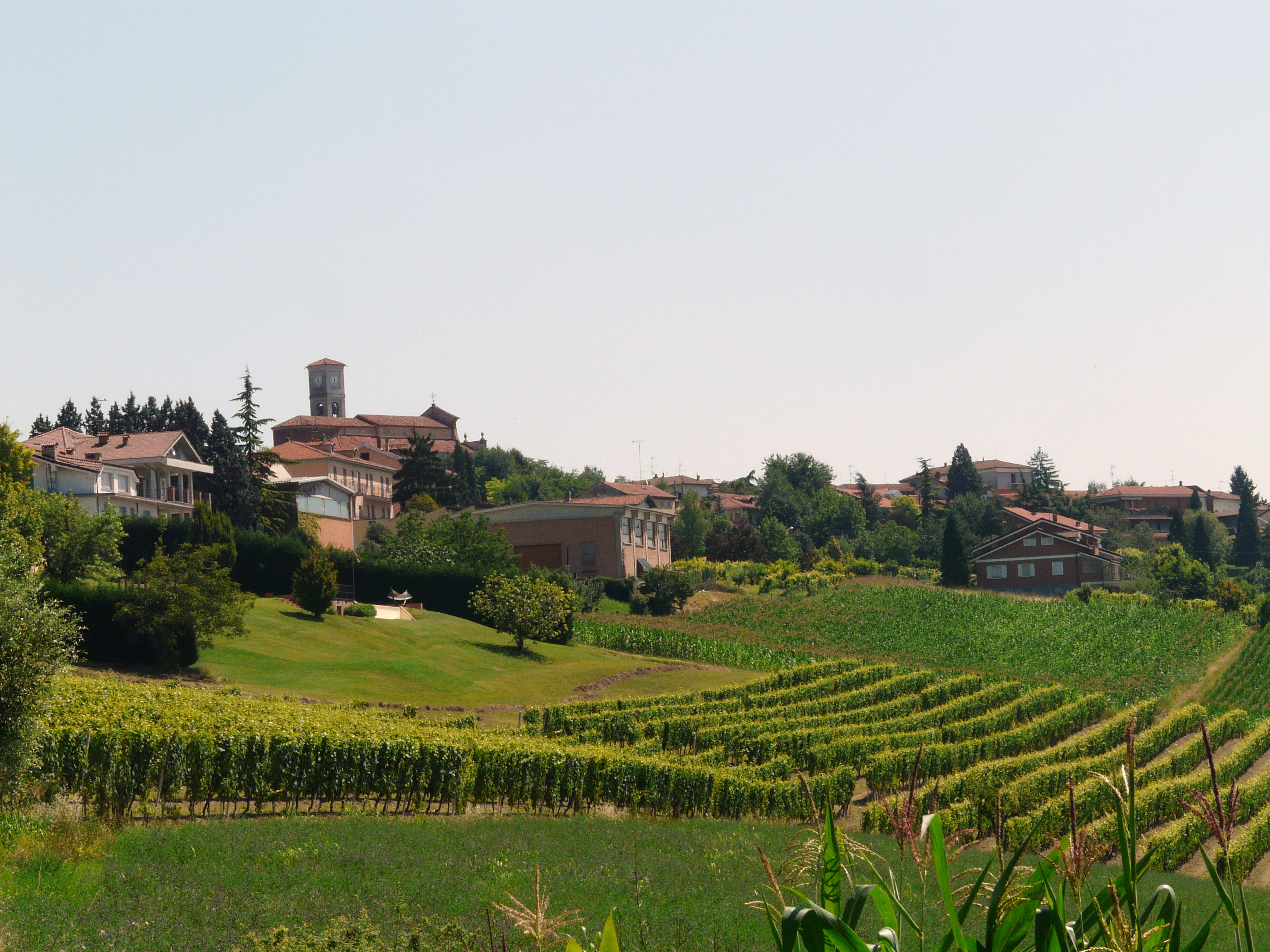 Panorama di Cuccaro Monferrato, Piemonte, Italia